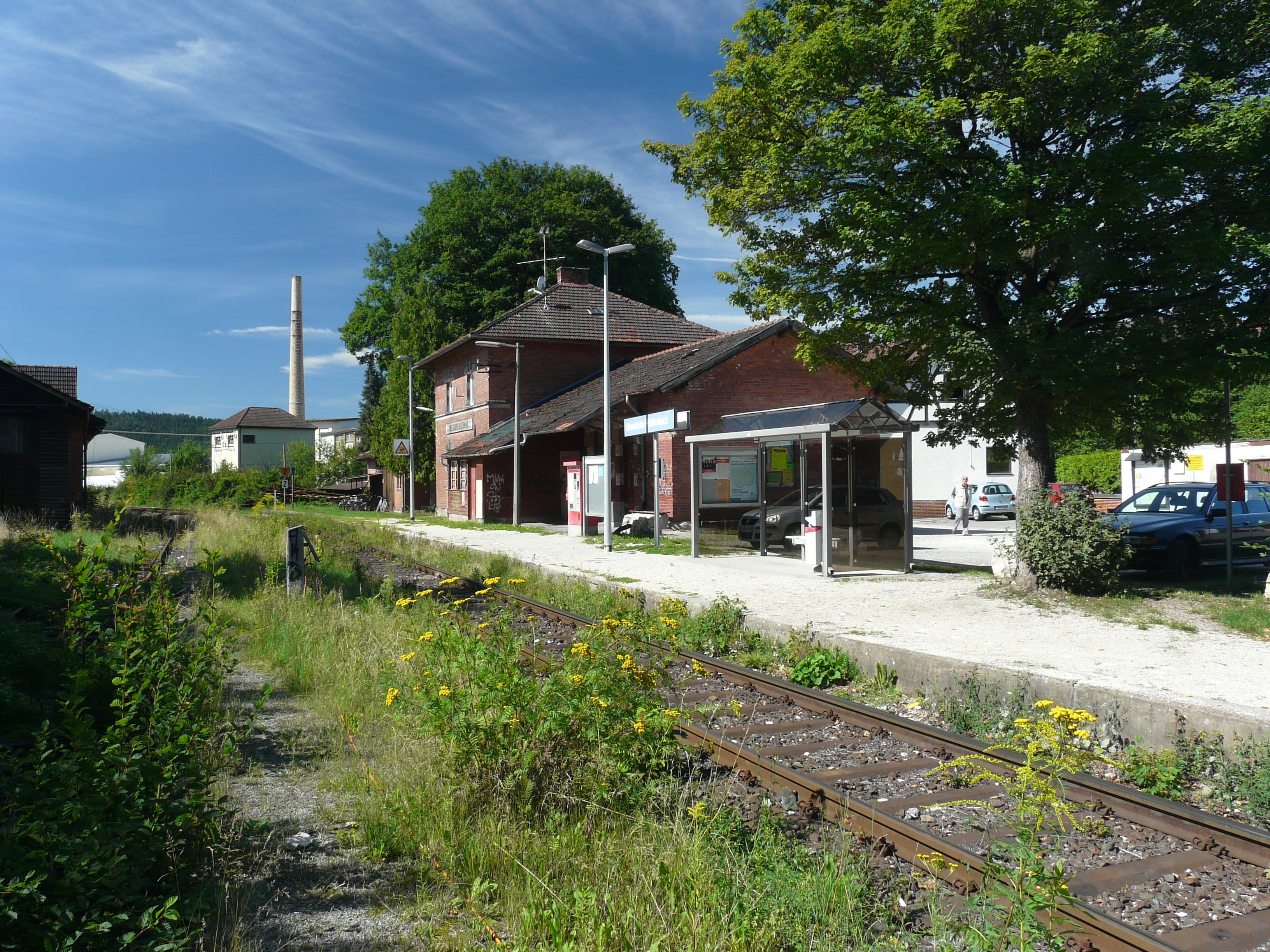 Simmelsdorf-Hüttenbach, der Endbahnhof der Schnaittachtalbahn